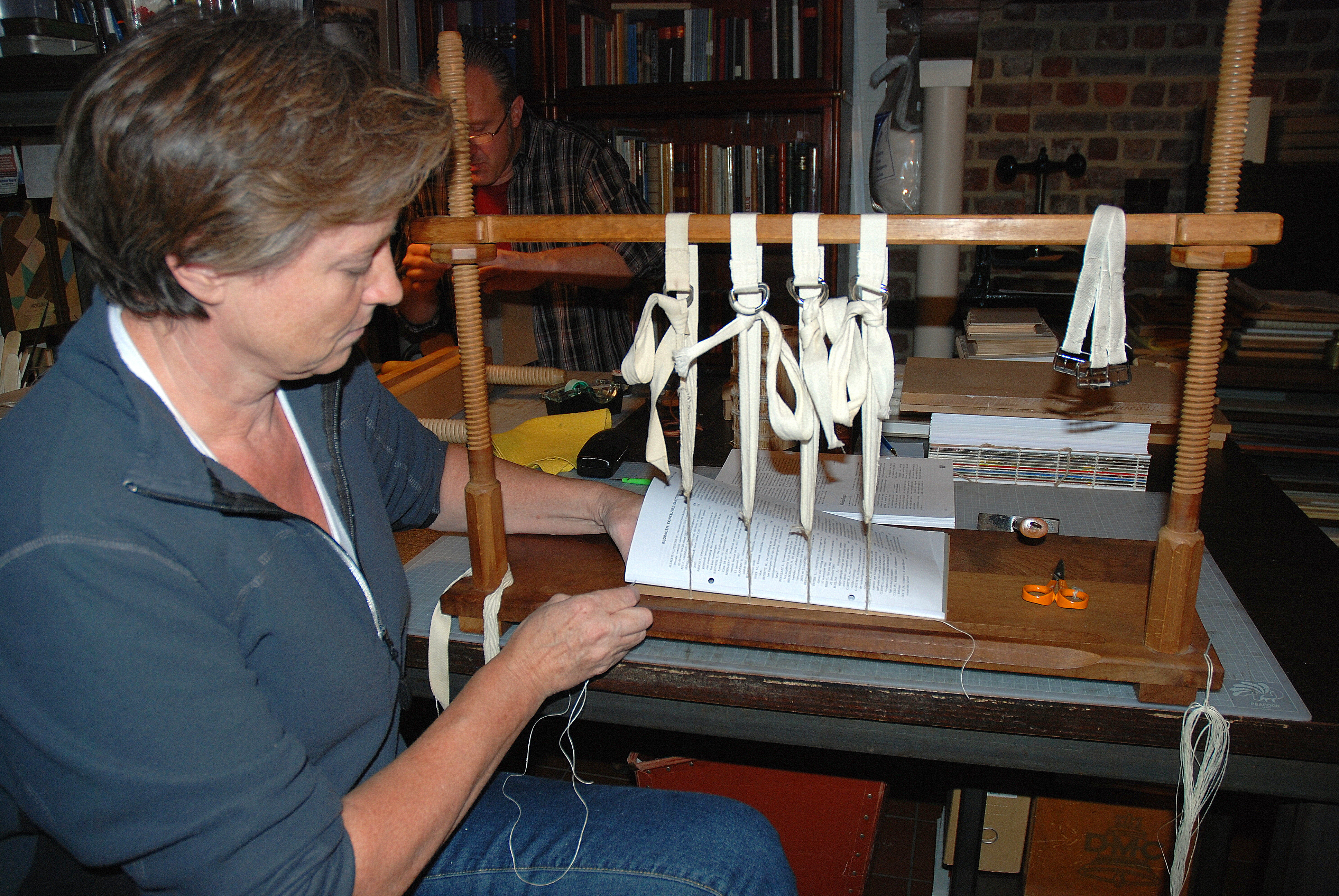 Een boekbindster te Diest (België)